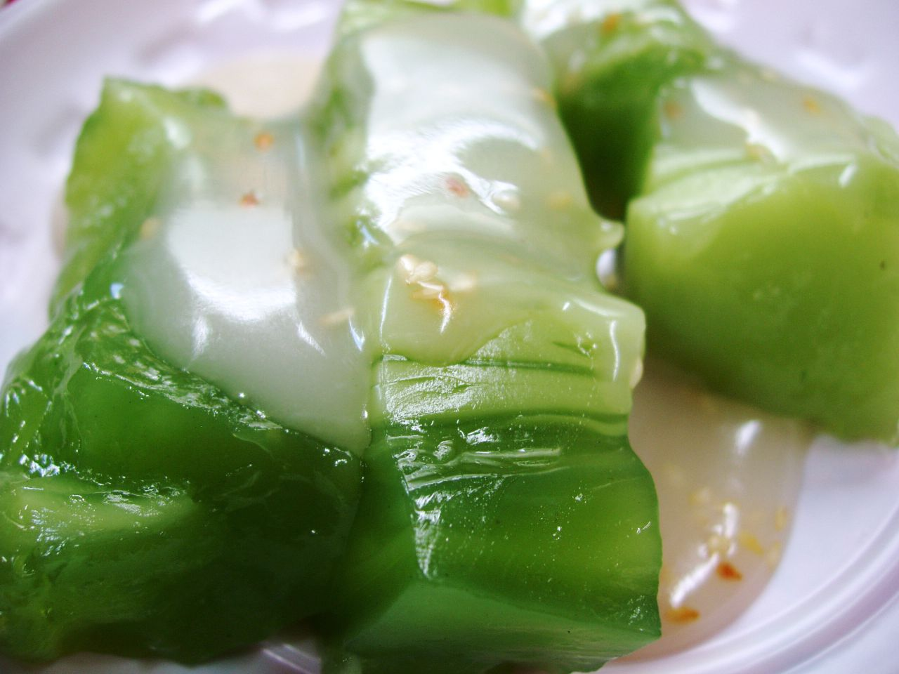 Vietnamese bánh đúc. Photo taken in Bà Điểm commune, near Hóc Môn district, Ho Chi Minh City, Vietnam, at a death anniversary ceremony.